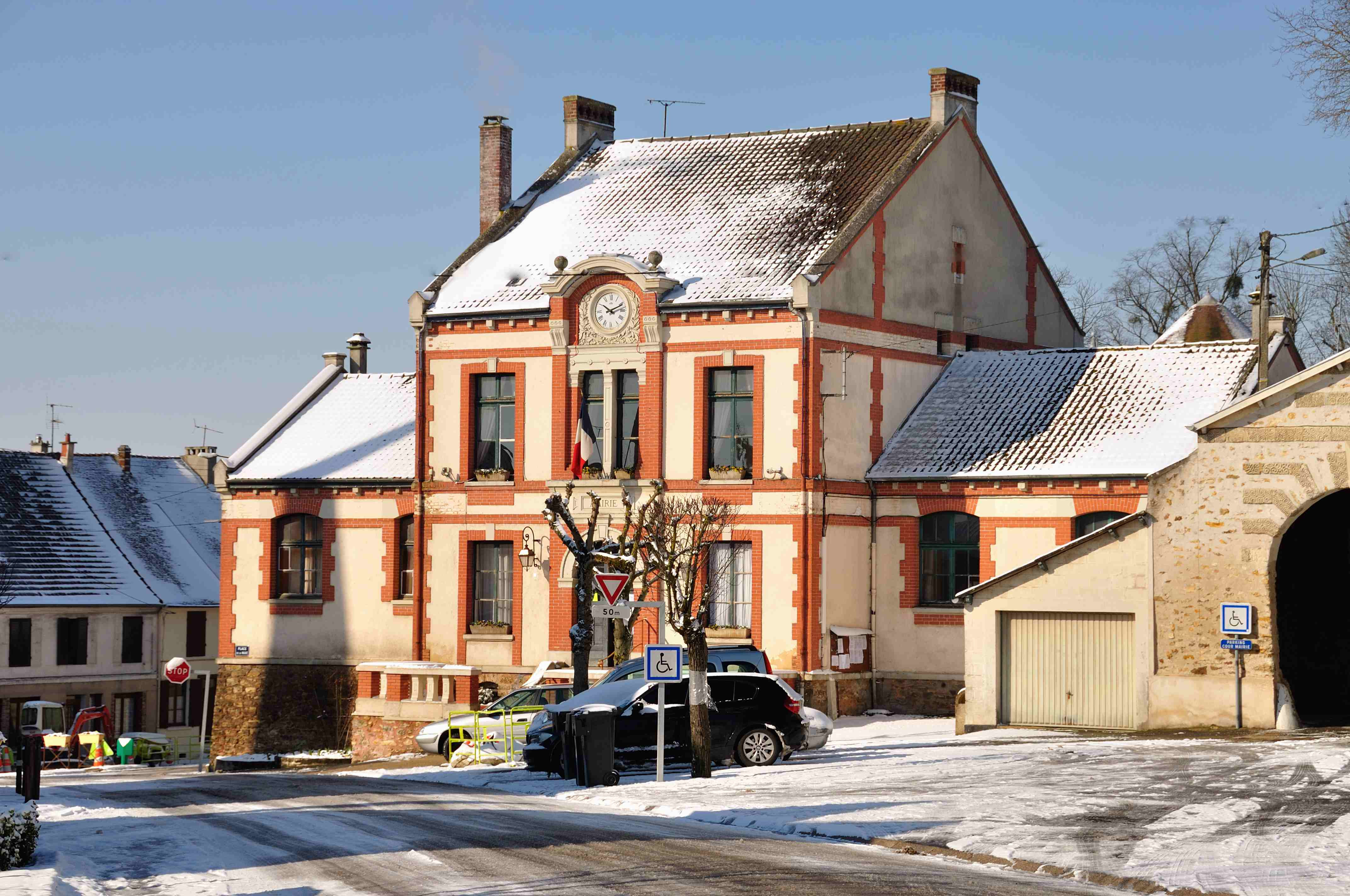 Mairie de Boissy-le-Châtel, mars 2013 : à huit jours du printemps. (département de la Seine et Marne, région Île-de-France).